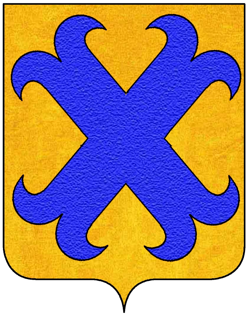 Stemma della famiglia Broglio